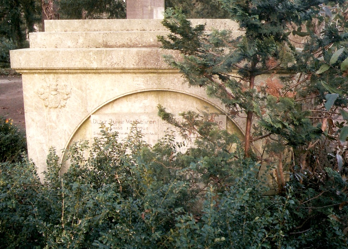 Vermehrens Grab auf den Burgtorfriedhof